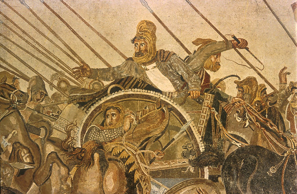 Darius III. aus Baumeister: Denkmäler des klassischen Altertums. 1887. Band II., Tafel XXI. Der Ausschnitt aus dem Mosaik der Alexanderschlacht (heute in Neapel zu sehen) zeigt den entscheidenden Moment der Schlacht. Der überraschende Angriff des Alexander zeigt blankes Entsetzen in den Augen des Darius III.